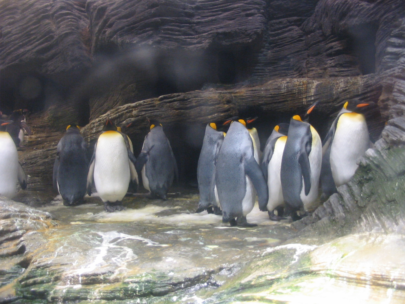 Belgium, Anwterp Zoo, King Penguins